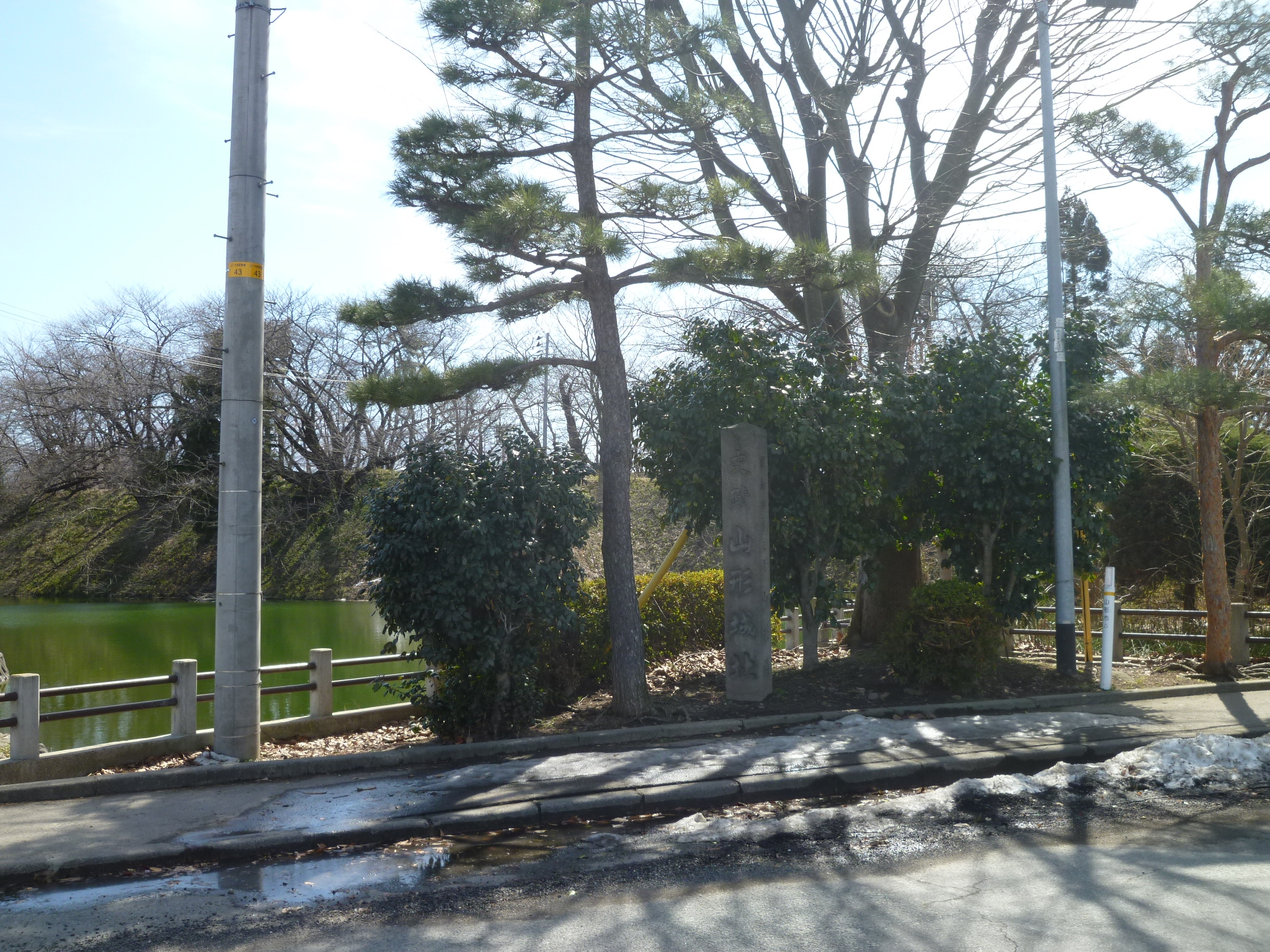 山形城址碑。 山形県山形市、霞城公園北門に所在。